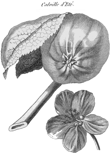 Rozier. Cours d'agriculture, tome 8, planche 20, calville d'été (pomme)